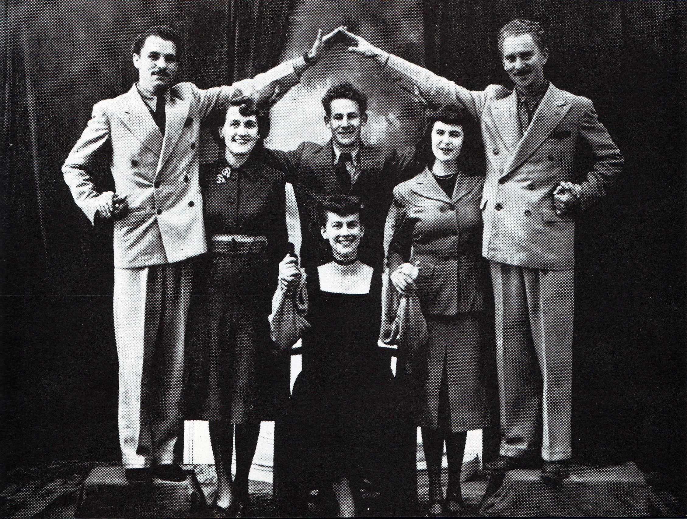 Die Hanekoms se Jongspan in 1947. Agter: Eghard van der Hoven, Tilana Hanekom, Daan Retief, Hentie van Rooyen en Danie Smuts. Voor: Martie Groenewald.